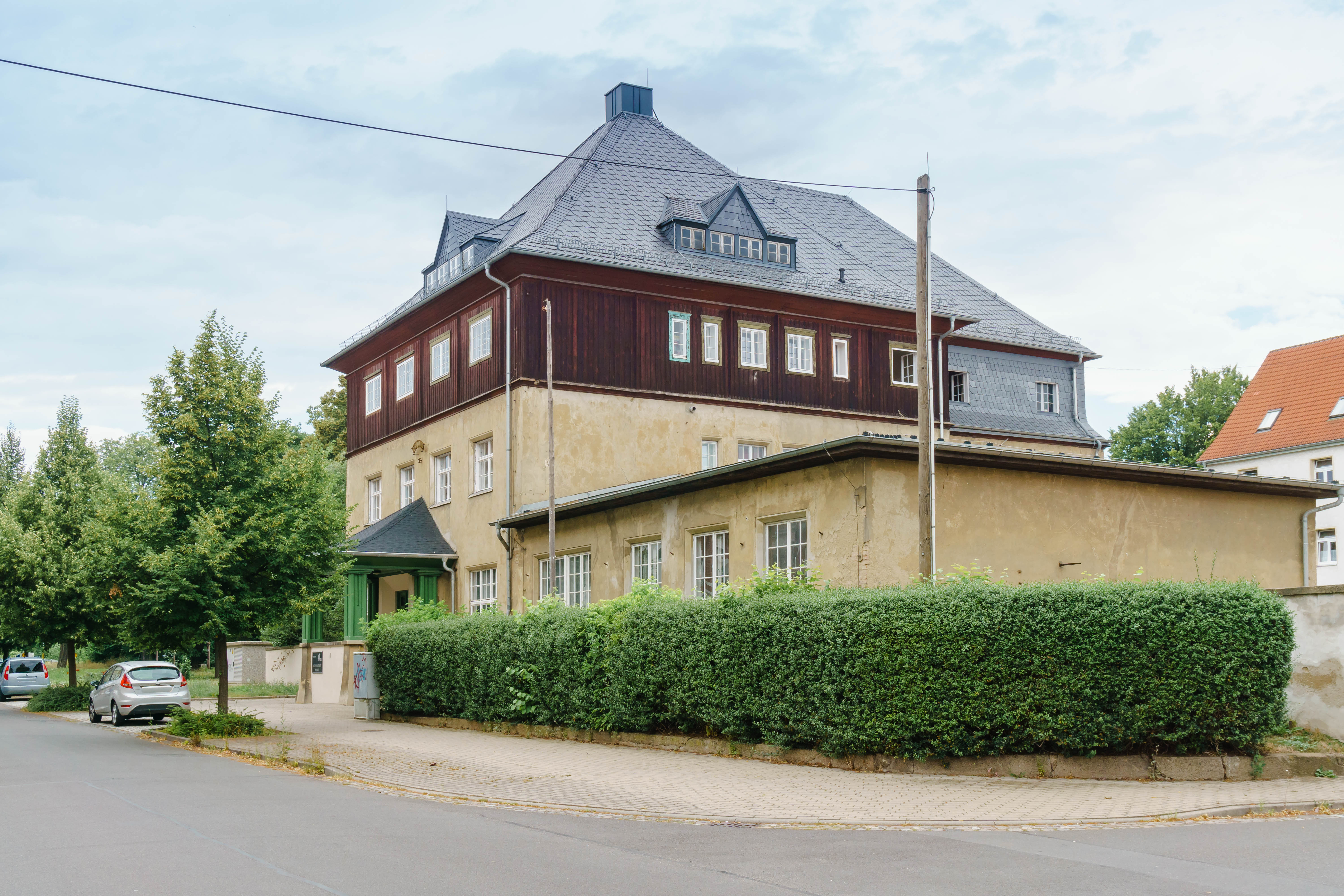 Ehemaliges Postamt, Bahnhofstraße 24 in Pegau